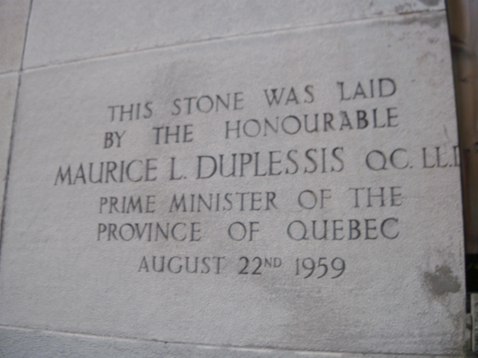 Pierre placée, lors de l'inauguration de l’Hôpital Reine Elizabeth, par Maurice Duplessis quelques jours avant son décès. Montréal 1959